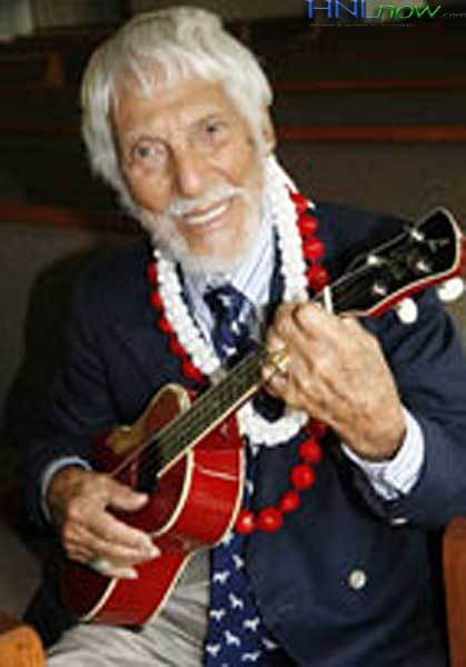 bill tapia, el musico mas viejo del mundo